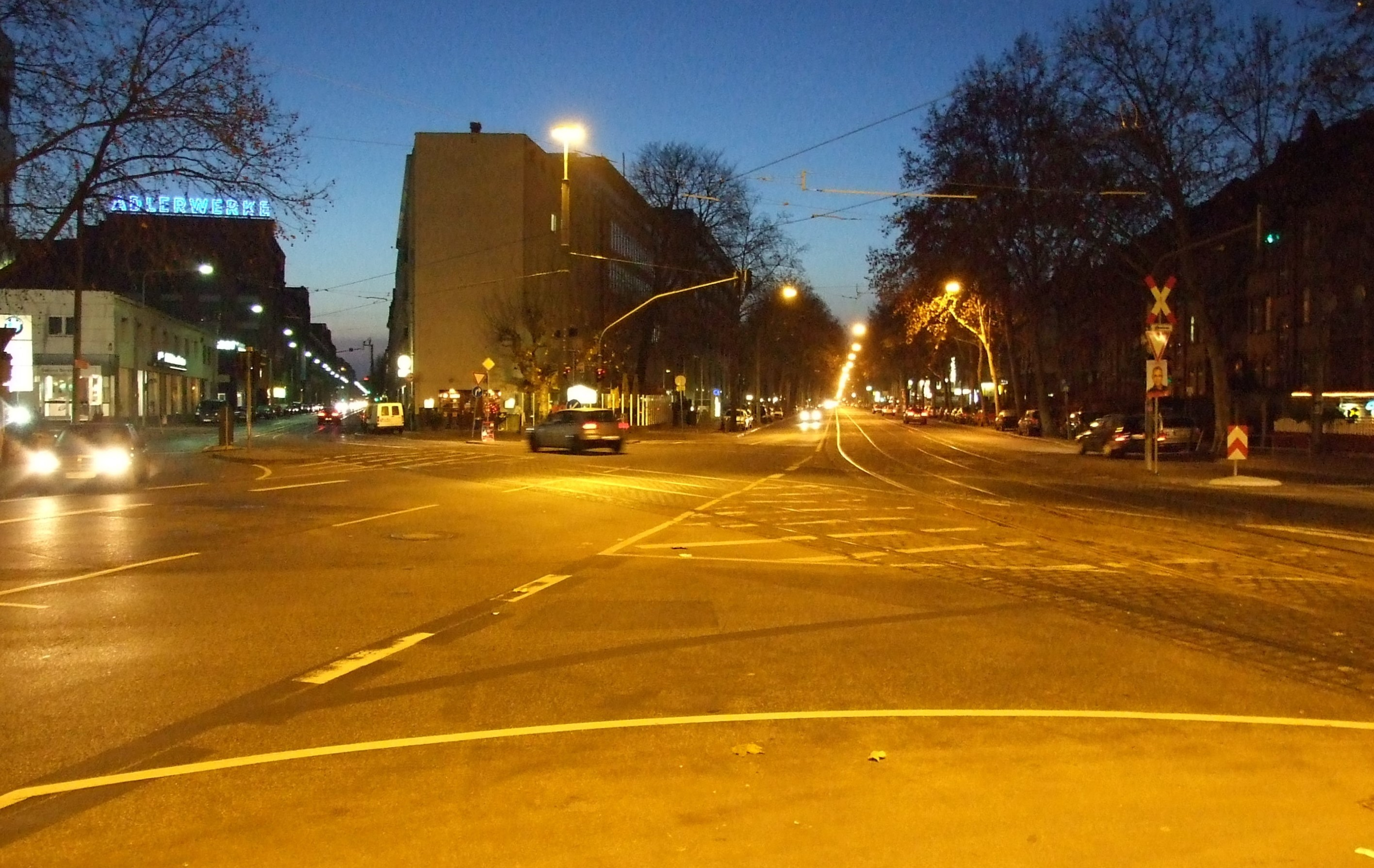 Kreuzungs-Kreisel Galluswarte, Blickrichtung West, Kleyerstrasse (Adlerwerke) und Mainzer Landstrasse, Richtung Hoechst